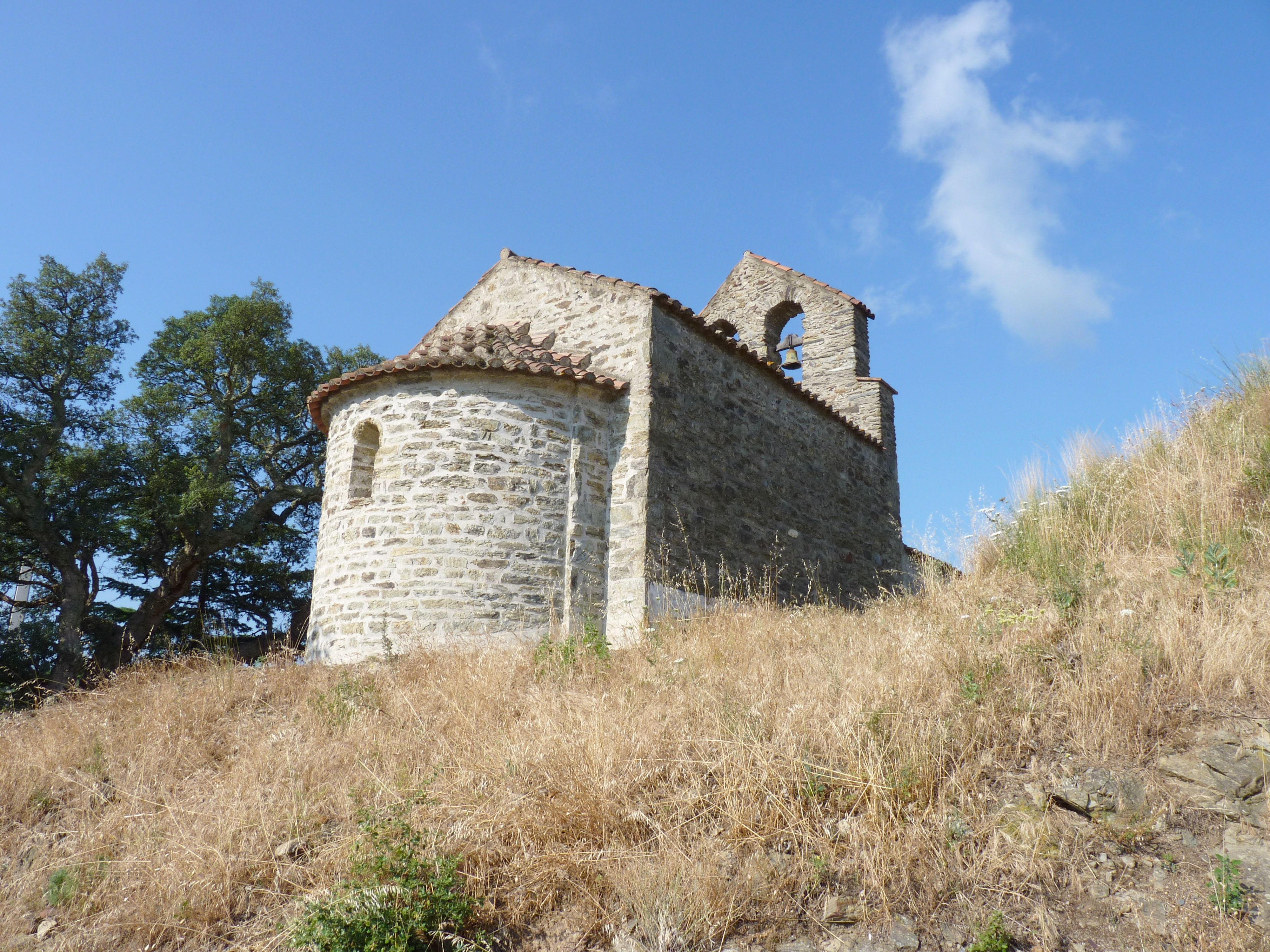 Notre-Dame de la Roure, Taillet (Pyrénées-Orientales, Languedoc-Roussillon, France)